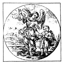 L'ange gardien,image ornant la passacaille C105 de HIF Biber (vers 1678)